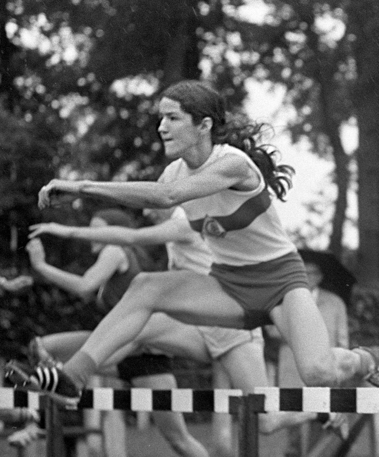 Atletiekwedstrijden dames en heren, Breda; 150 meter horden dames; rechts H. Vooijs (2e) en links van haar Trudy Ruth (1e)